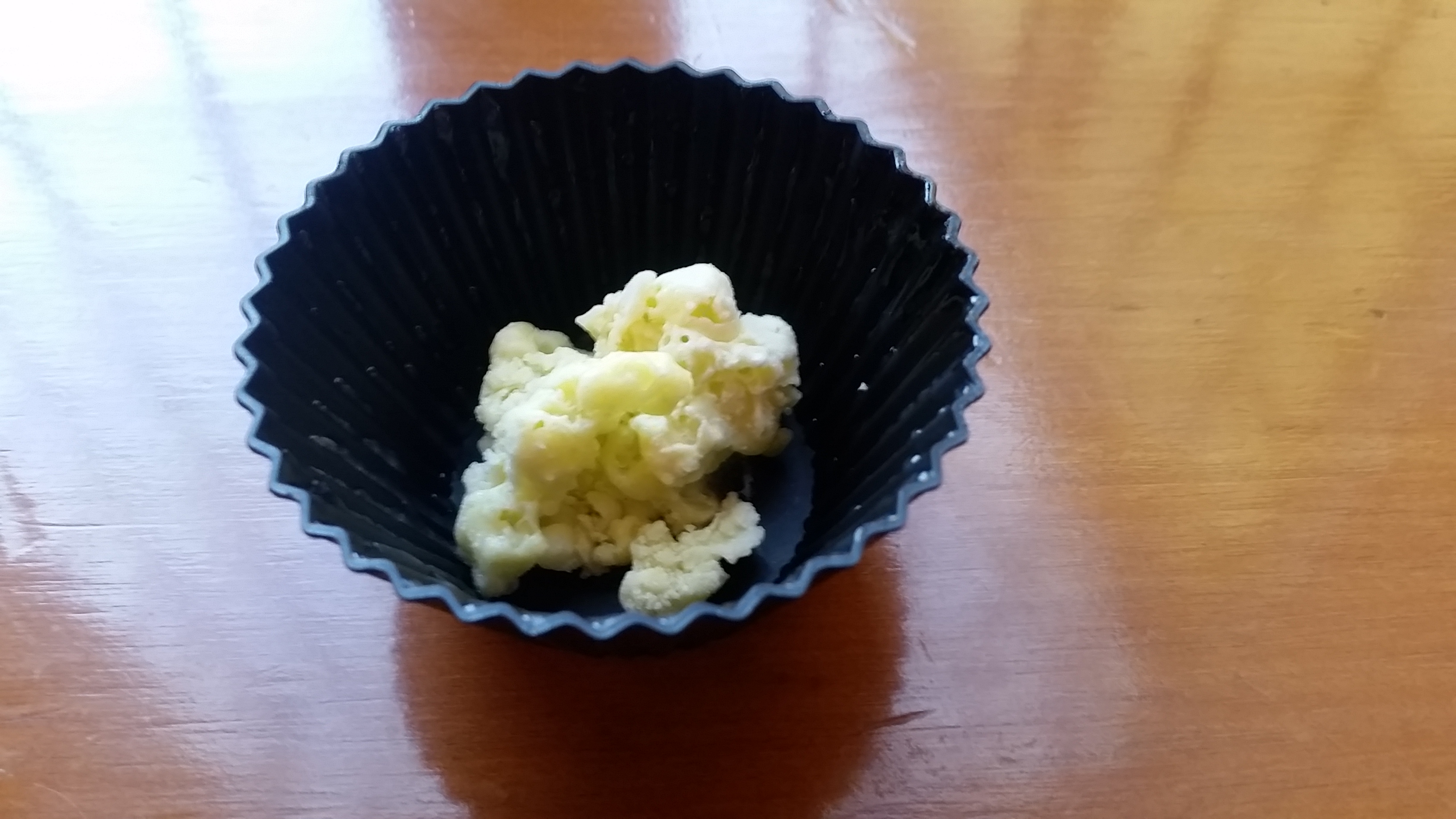 Producte finalitzat